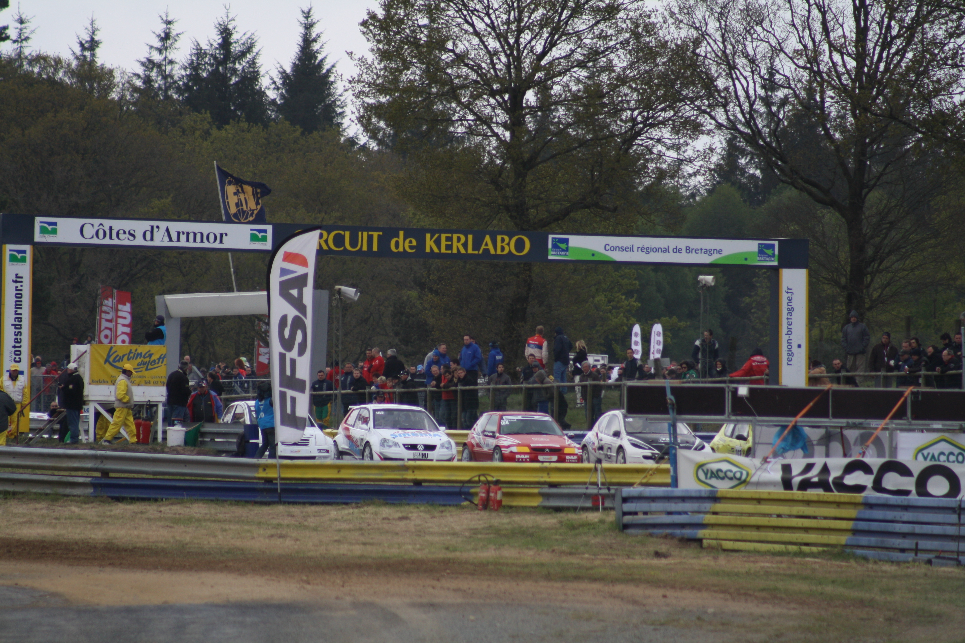 Vue de la ligne de départ du circuit de Kerlabo-Cohiniac le 9 mai 2010 lors des championnats de France de ralycross